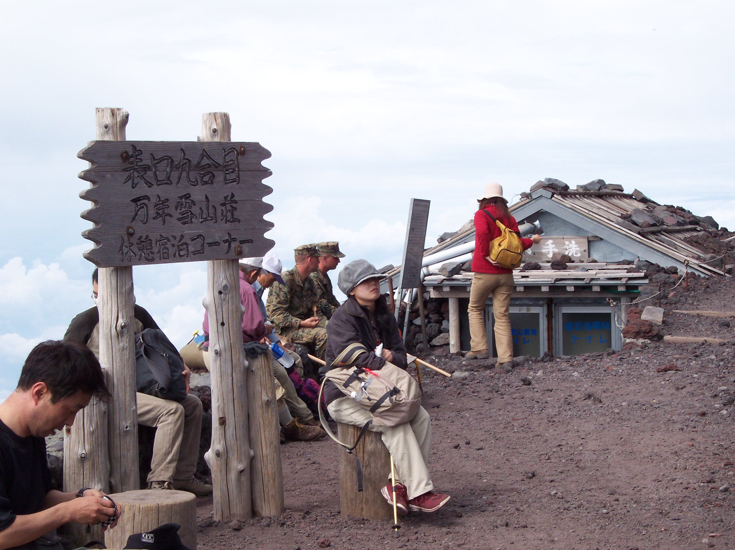 Pit stop.